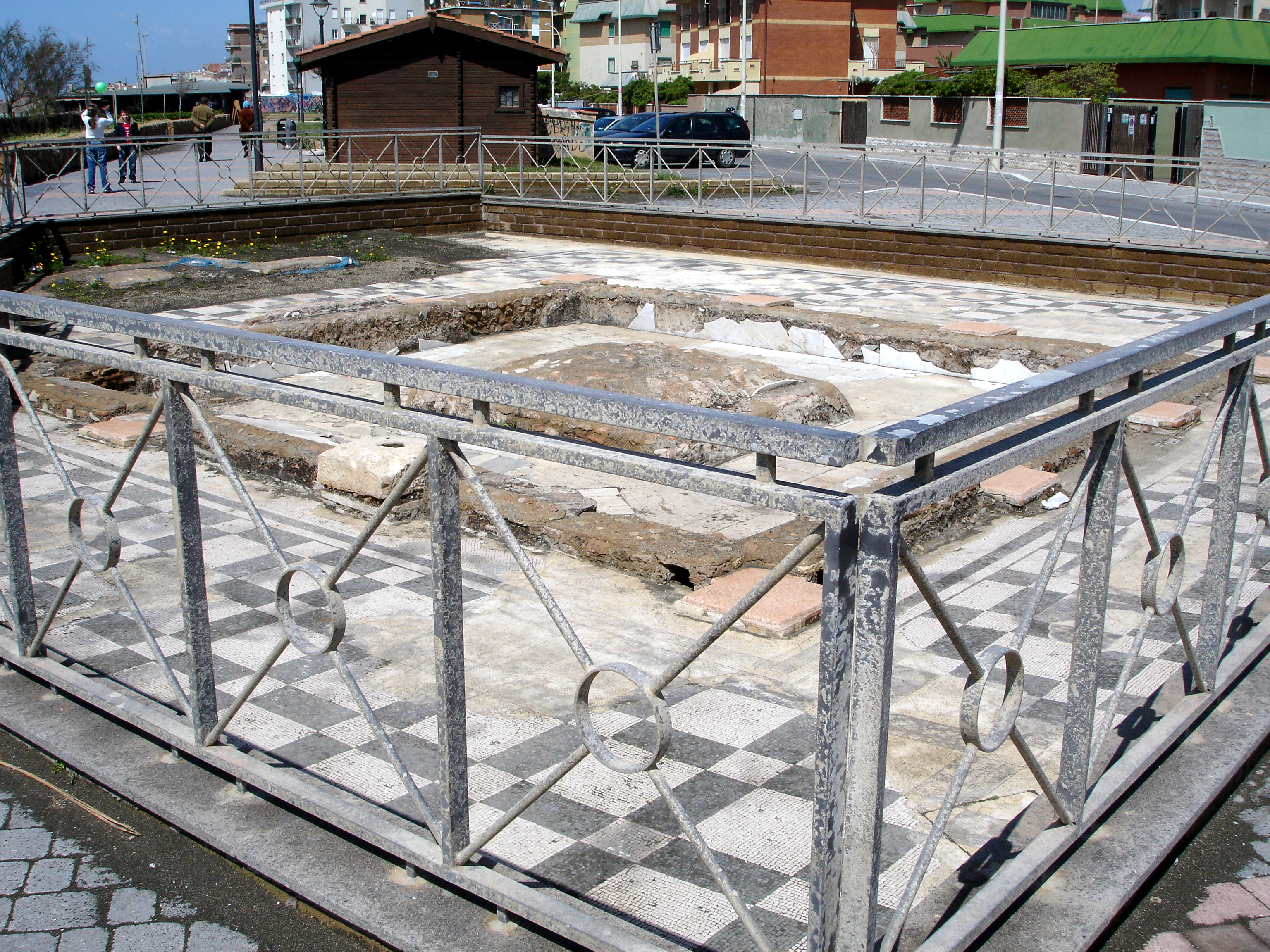 Villa romana sul lungomare di Ladispoli